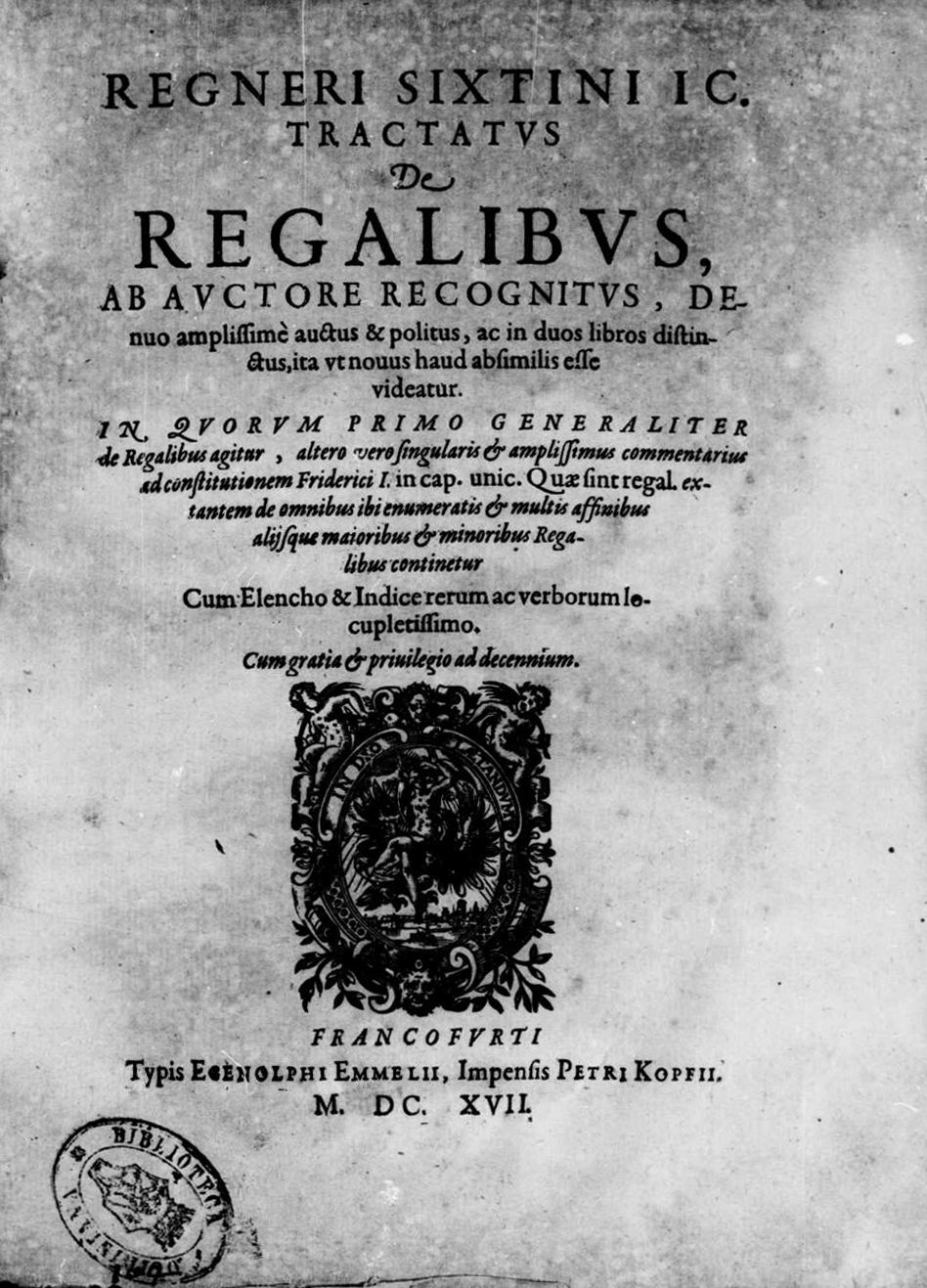 Frontespizio